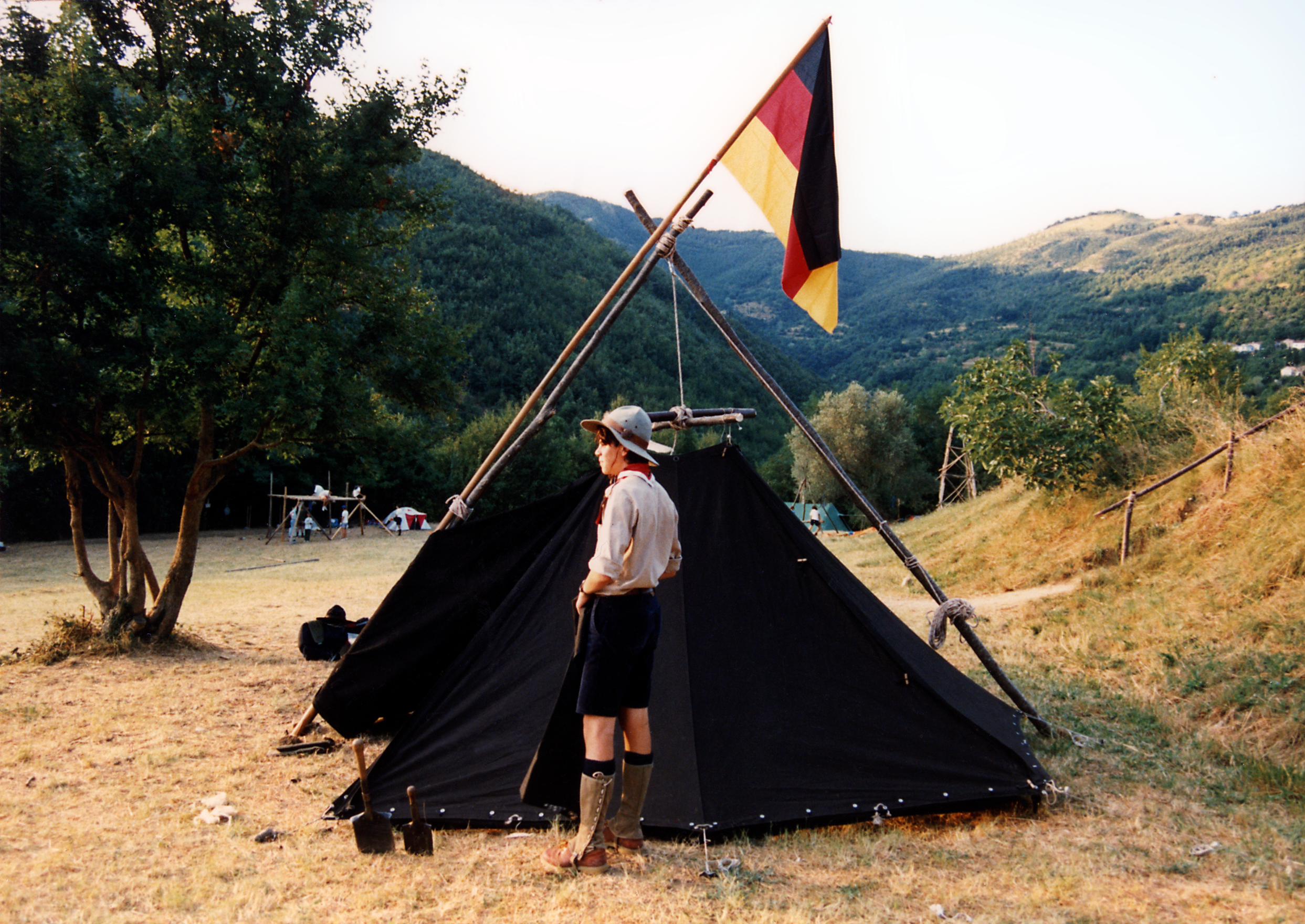 Internationales Sommerlager „Interexplo Italia ’93 – The Spirit of B.P.”, das vom 09.08. bis 22.08.1993 auf dem Gelände der Associazione Guide e Scouts Cattolici Italiani (AGESCI) „Padre Ugo Berruto“ der Gruppen La Spezia 2 und 5 bei Arlia/Fivizzano, Toscana, stattfand. Organisiert hatten das Lager die Pfadfinder des Stammes Ägypten, Trupp Penzberg der Katholischen Pfadfinderschaft Europas (KPE) sowie AGESCI-Pfadfinder der Gruppe 5 aus La Spezia. Als weitere Gäste wurden die Pfadfinder der mit den Penzbergern befreundeten 73. Abteilung „Weißer Hirsch“ des ungarischen Magyar Cserkészszövetség (MCSSZ) aus Tapolca eingeladen. Im Bild: Nach dem Aufbau der Kohten am Ankunftsabend, Sonntag, 08.08.1993. Das Schwarzzeltmaterial war bei Klaus Wiese Ausrüstungen, Schönkirchen bei Kiel erworben worden und stammte noch aus deutscher Produktion von der Firma Stromeyer.